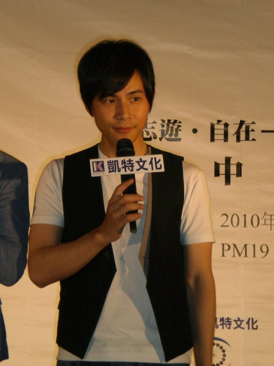 中文（台灣）: 2010.07.11 台中中友百貨 凱特文化孫協志「志遊自在－孫協志東京自漫之旅」簽書會